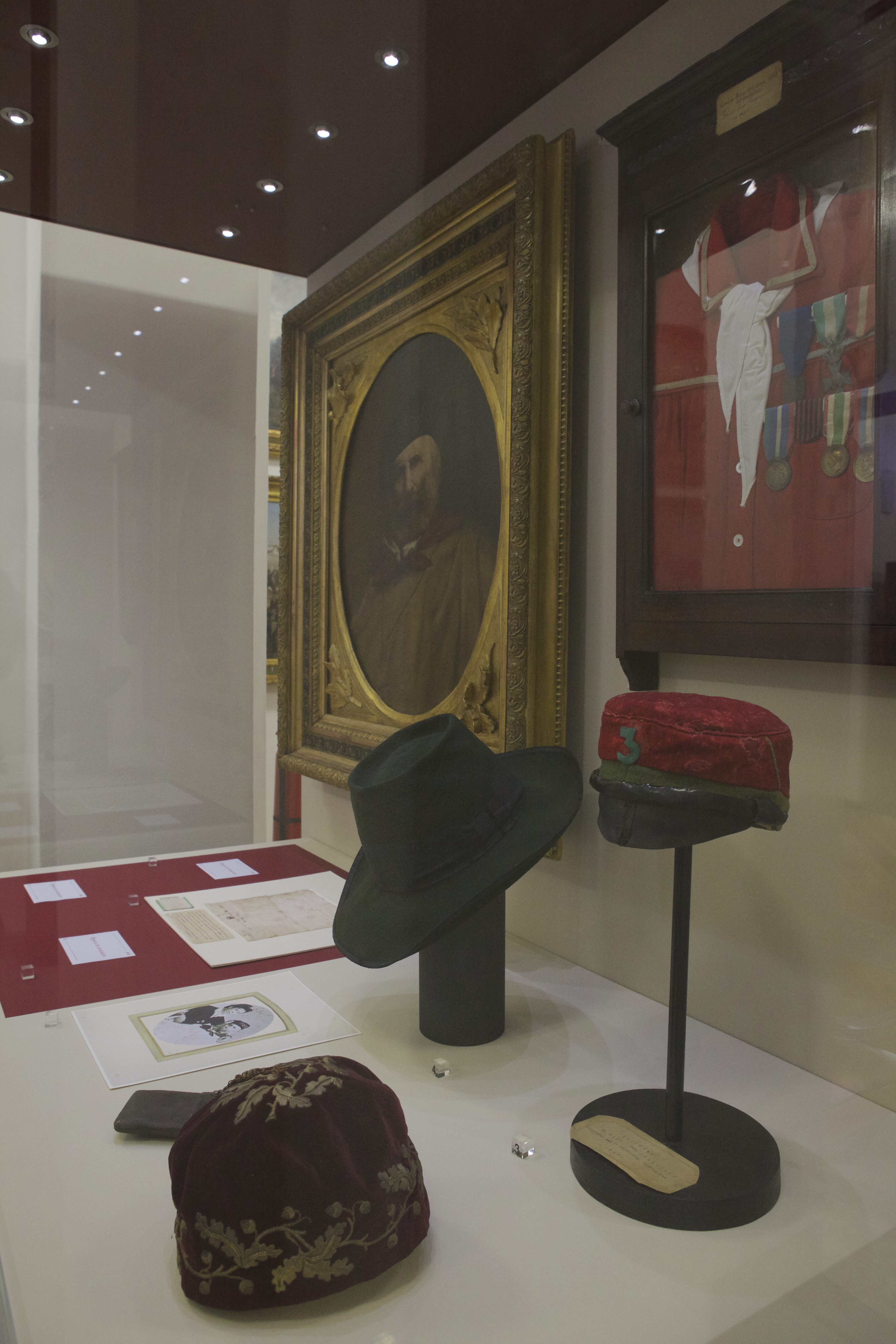 Museo del Risorgimento This is a photo of a monument which is part of cultural heritage of Italy.